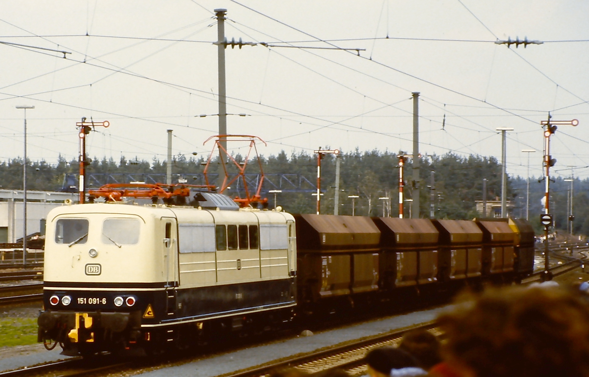 DB 151 091 mit Erzzug (Faal) bei der Jubiläumsparade 150 Jahre deutsche Eisenbahn in Nürnberg